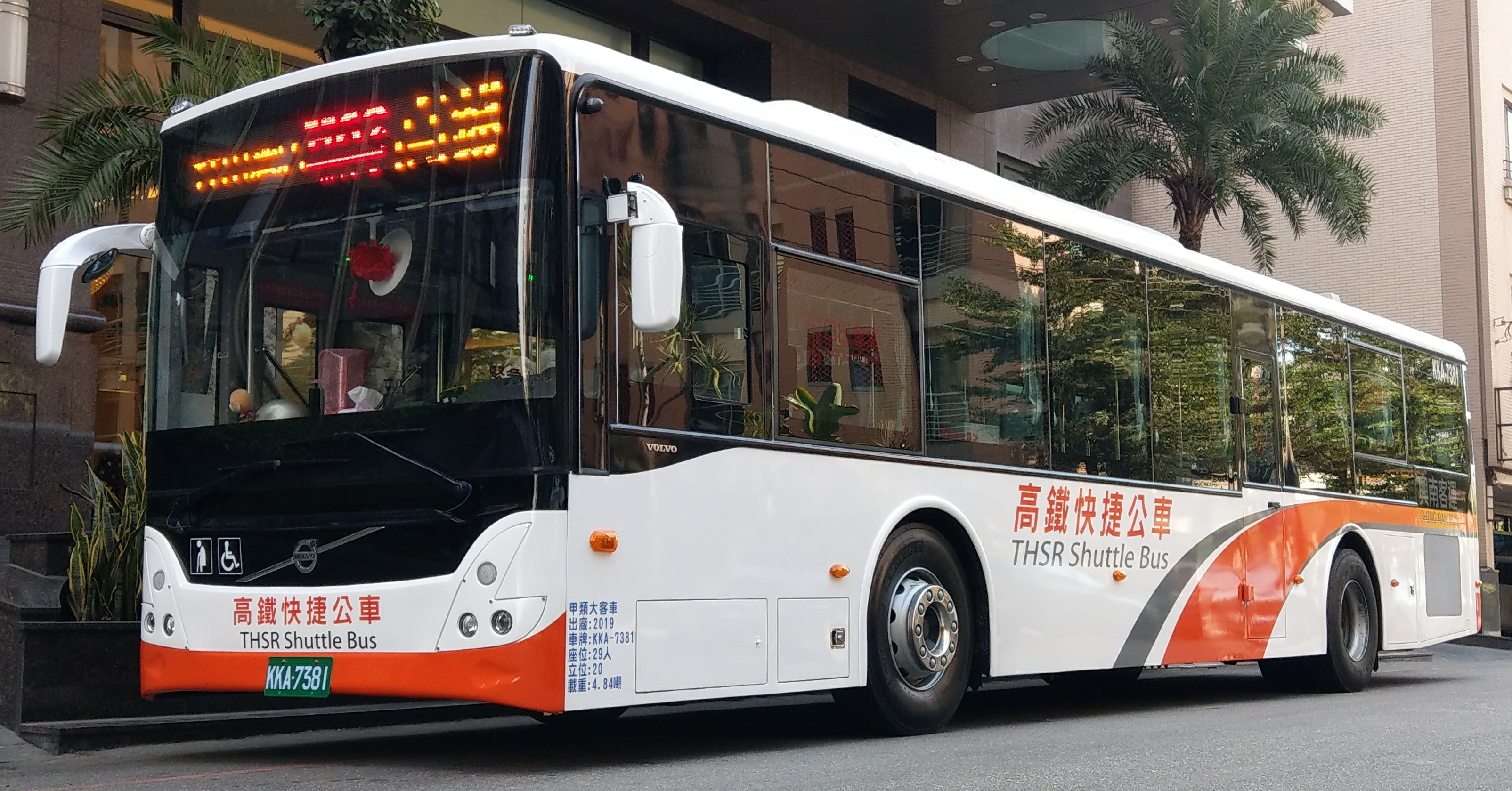 興南客運2019年11月出廠VOLVO B8RLE，高鐵快捷公車配車KKA-7381